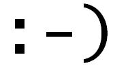 Lächelndes Emoticon.